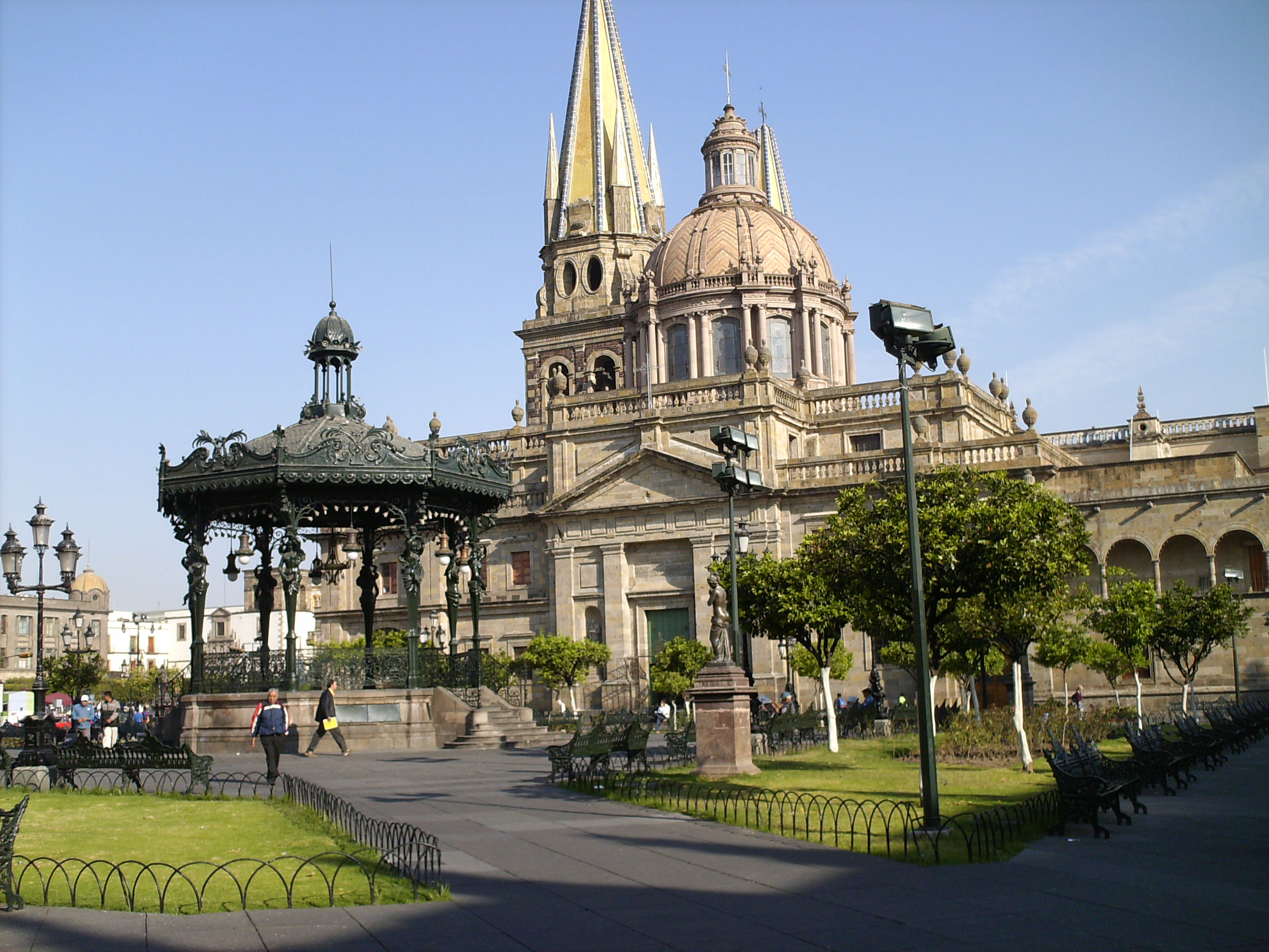 La Catedral de Guadalajara o Catedral Basílica de la Asunción de María Santísima, es parroquia sede de la Arquidiócesis de Guadalajara.